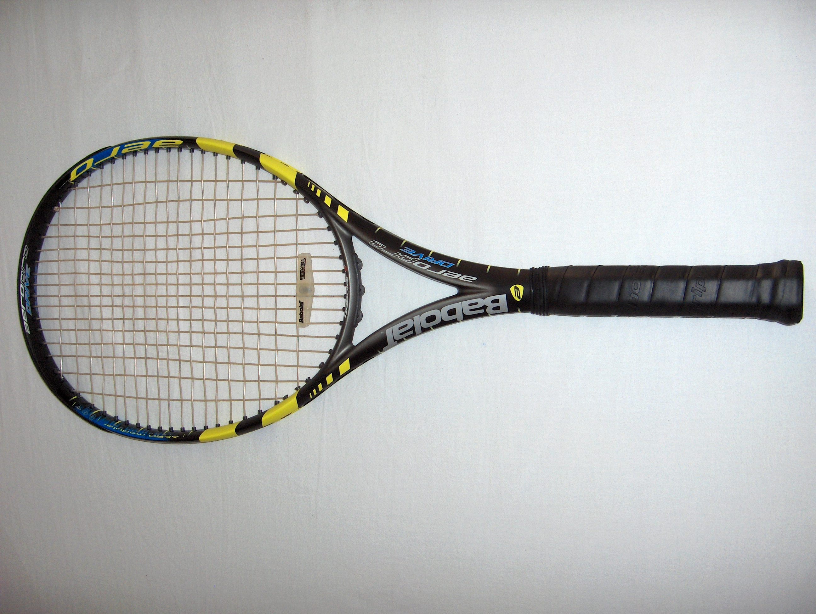 Raquette de tennis moderne, Babolat Aeropro Drive. Photo personnelle, sans licence.